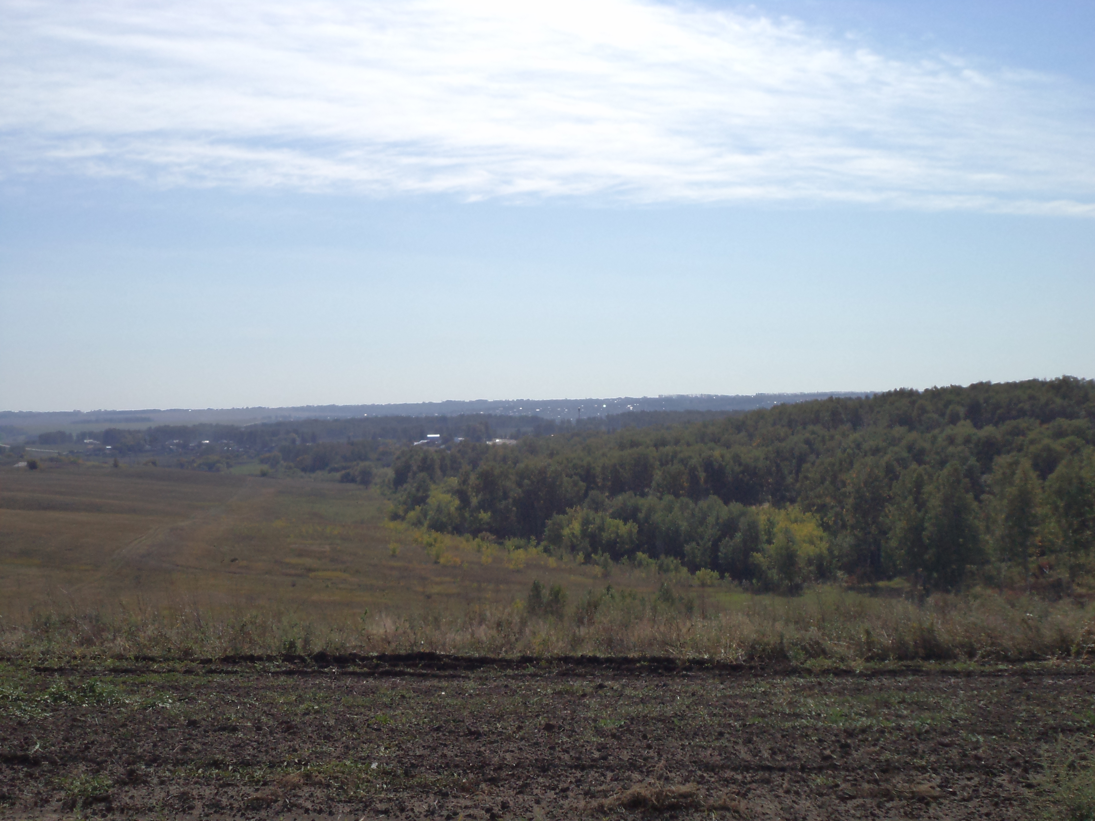 пос. Березовка Ленинского района г. Барнаула